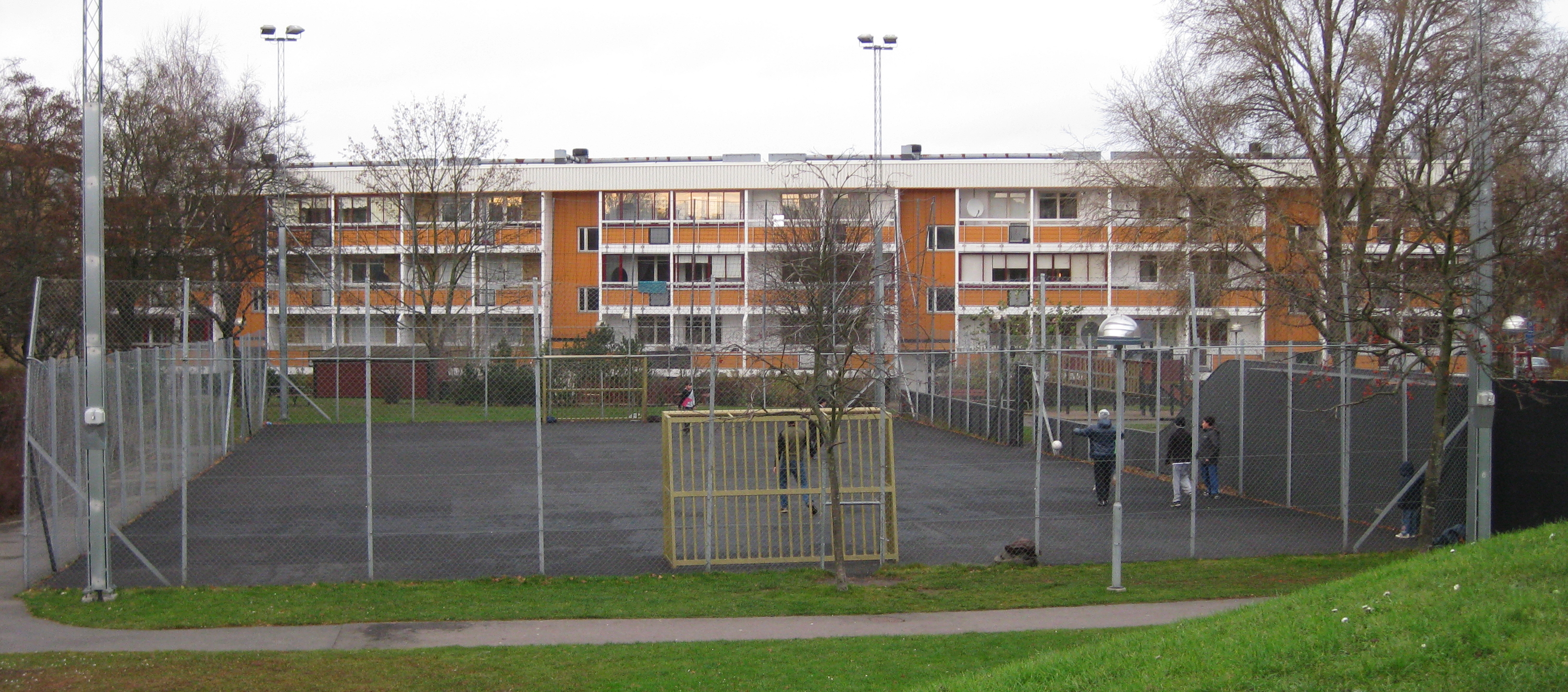 Zlatan court i Herrgården på Rosengård